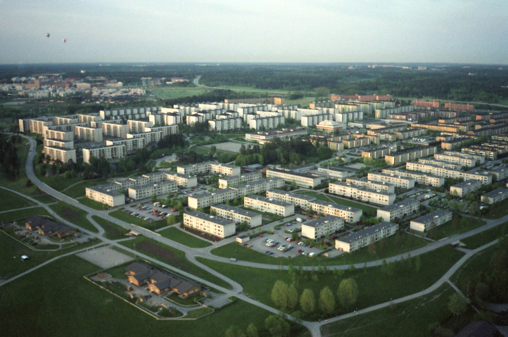 Rinkeby från Ballong, vy mot nordost i maj 1988.